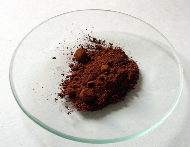 CdO